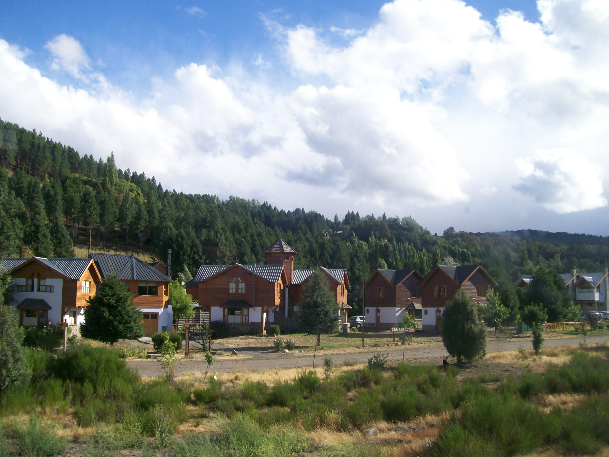 San MArtín de los Andes - Barrios de alrededores de la ciudad